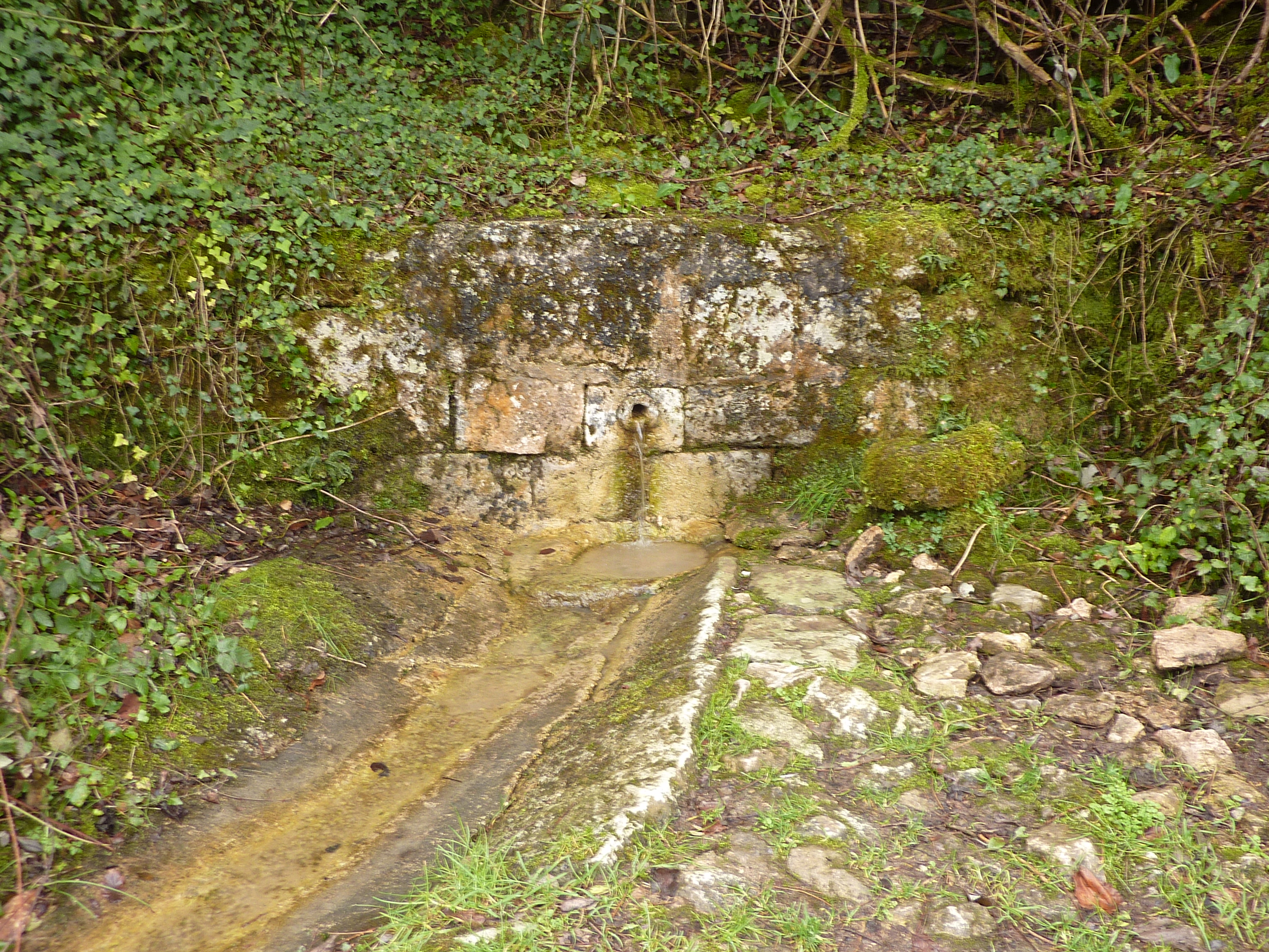 la fatica della passeggiata al colle San Nicola è allietata dalle fresche acque di questa fonte